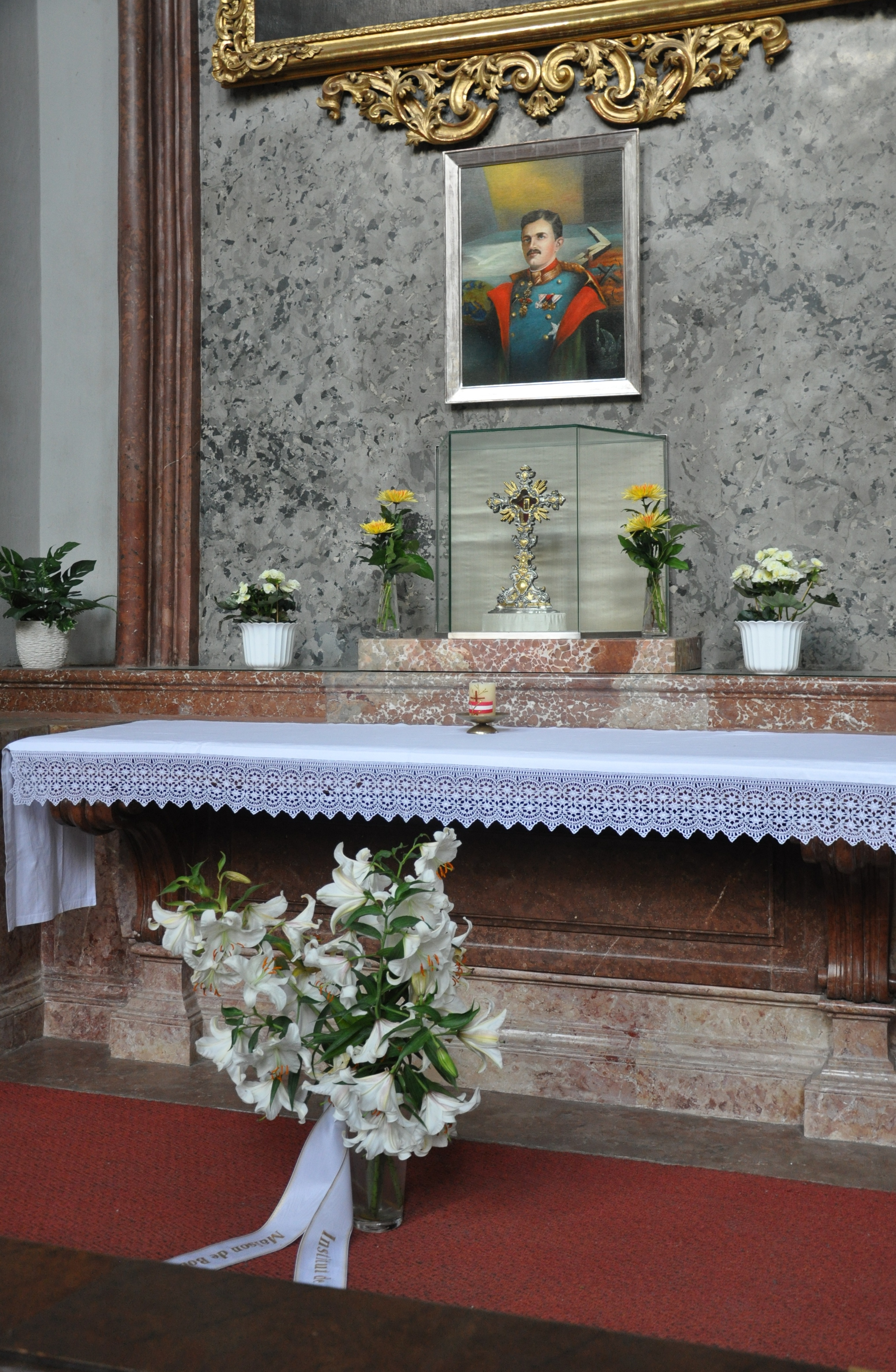 Wien, Augustinerkirche, Altar mit Bild des seliggesprochenen Kaisers Karl I.